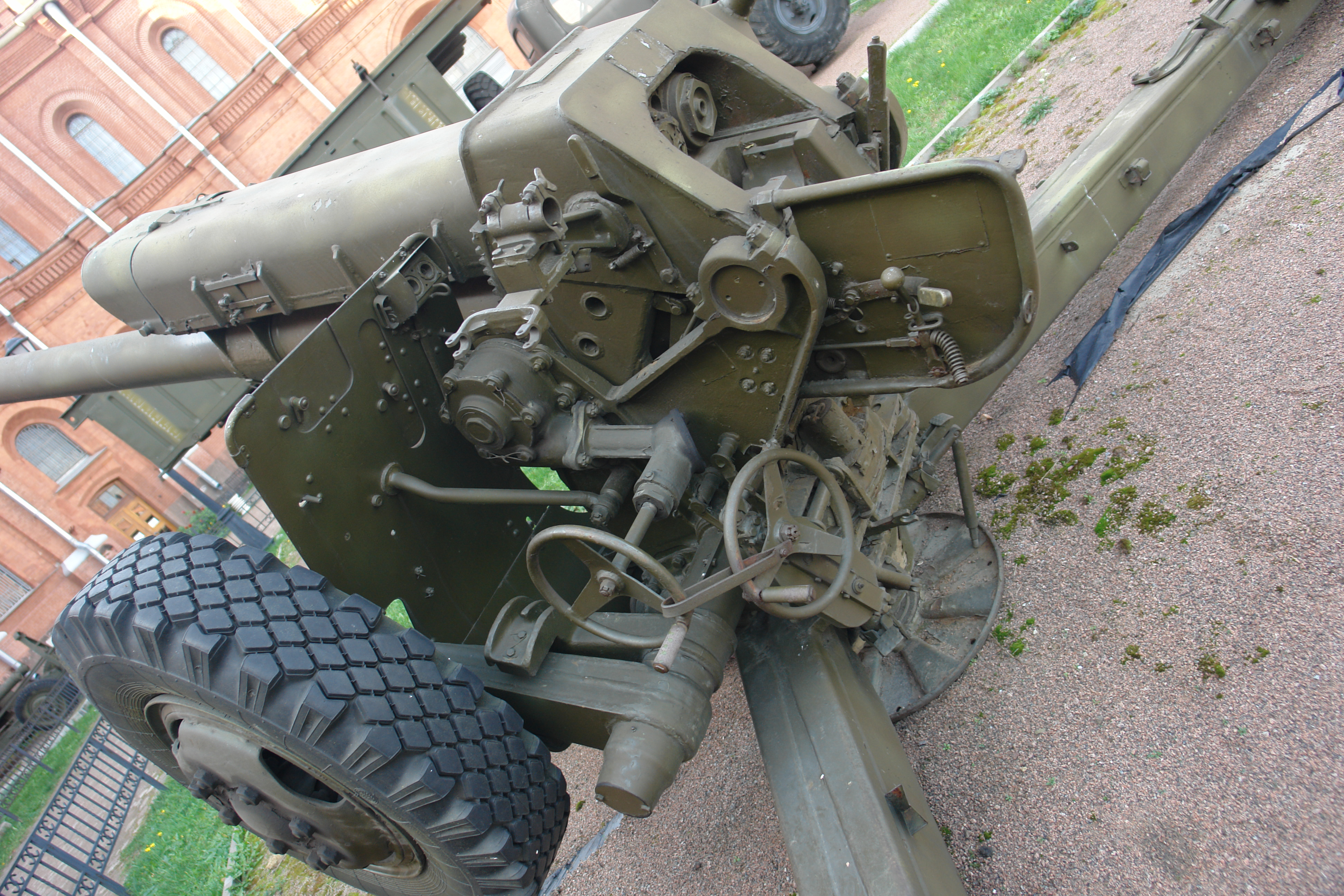 122mm Haubitze D-30 (2A-18) Chef-Designer FF Petrov (1960). Reichweite : 15300m Kadenz : 6-8 Schuß/min. Gewicht : 3200, Geschoßgewicht: 22 kg Bedienung : 6 Soldaten Quelle : Militär-Historisches Museum der Artillerie, Ingenieure und Signal Corps, St. Petersburg.